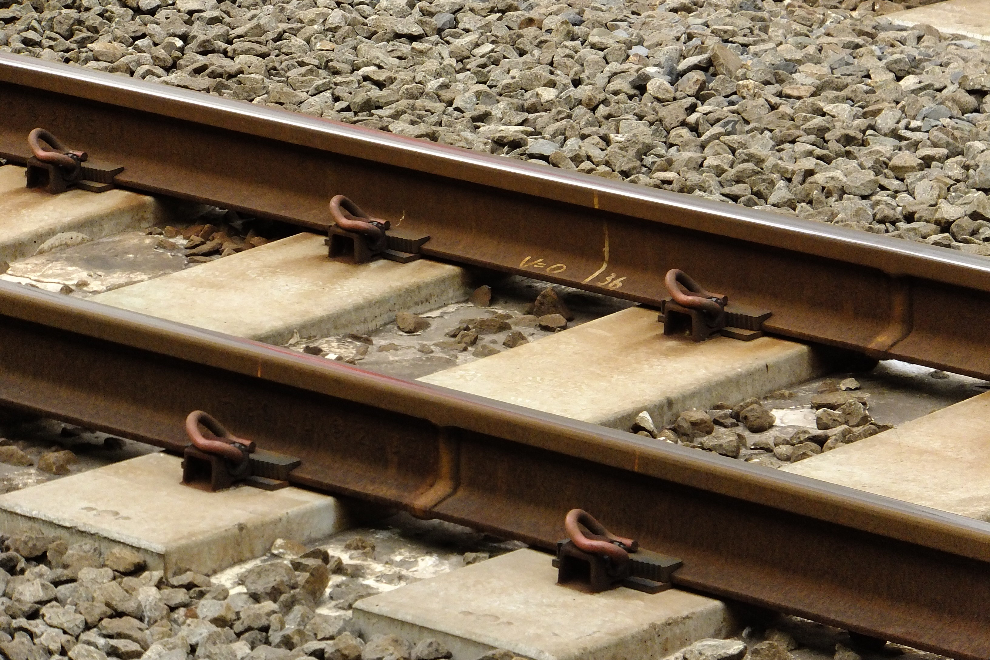 通常のものより倍近い幅があるPC枕木。JR蒲田駅にて。